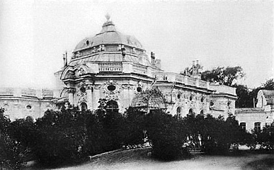 Yusupov Dacha in Tsarskoe Selo